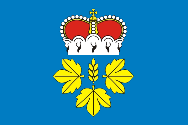 Jedná se o vlajku obce Kněžnice, Královehradecký kraj